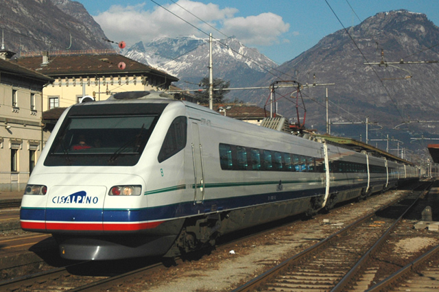 Treinstel ETR 470-8 van Cisalpino te Domodossola naar Milaan.